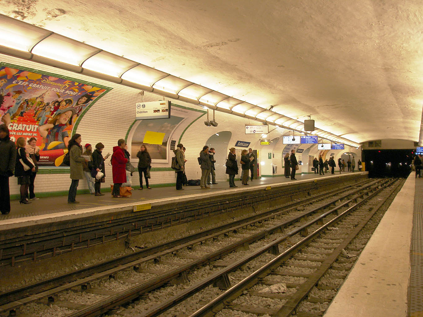 Métro de Paris (France) - ligne 13 - Station Saint-Lazare, mercredi 23 janvier 2008 à 20h45 Photo personnelle (own work) de Clicsouris